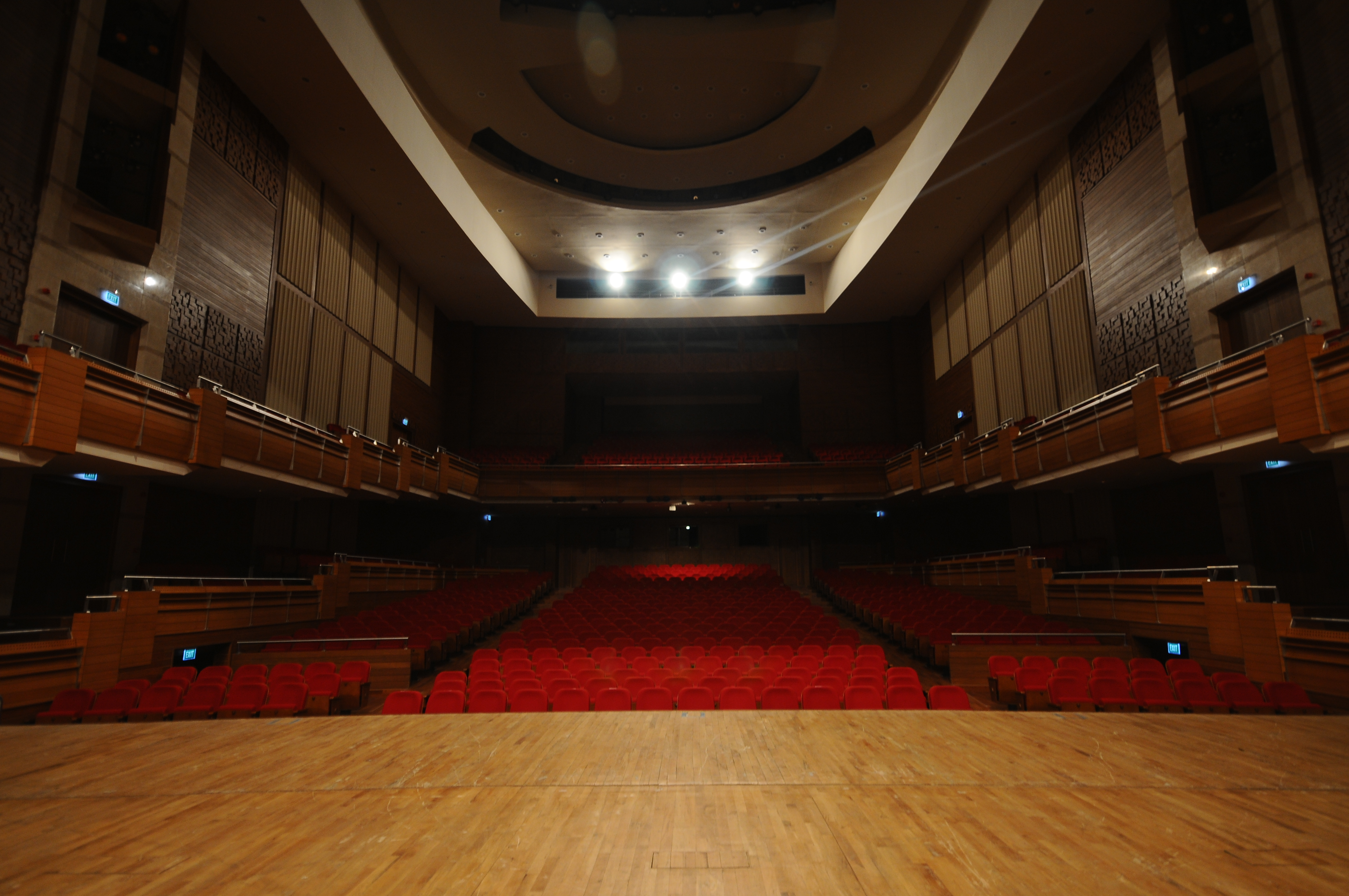 View from the big concert hall's stage